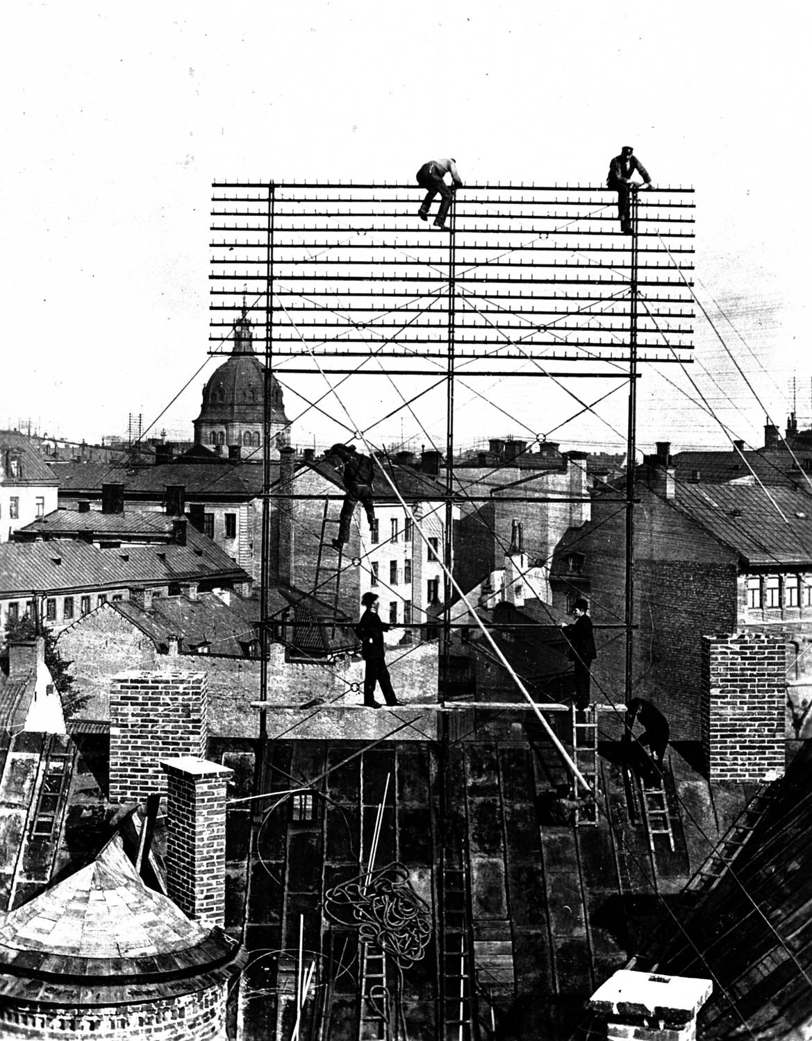 depicted place: Stockholm, Biblioteksgatan (Sverige (SE))